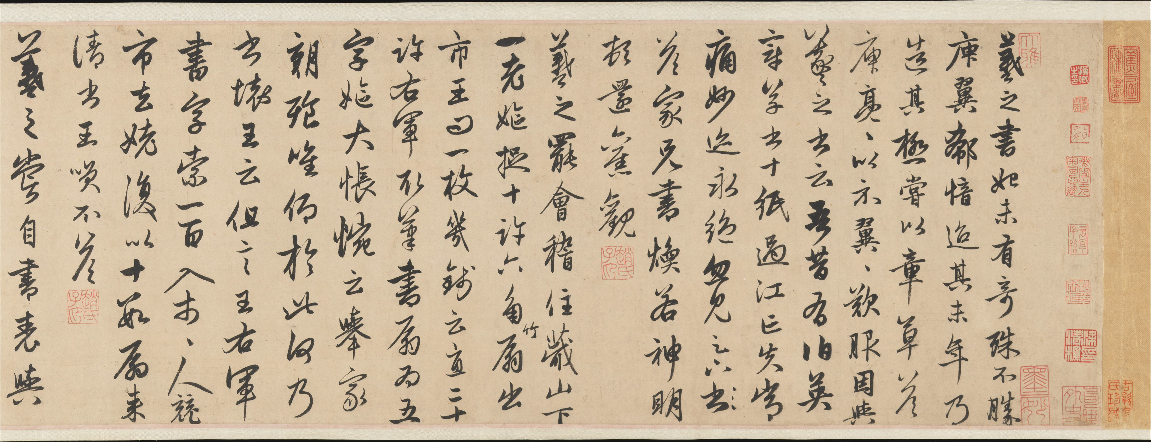 中文（中国大陆）: 行書右軍四事